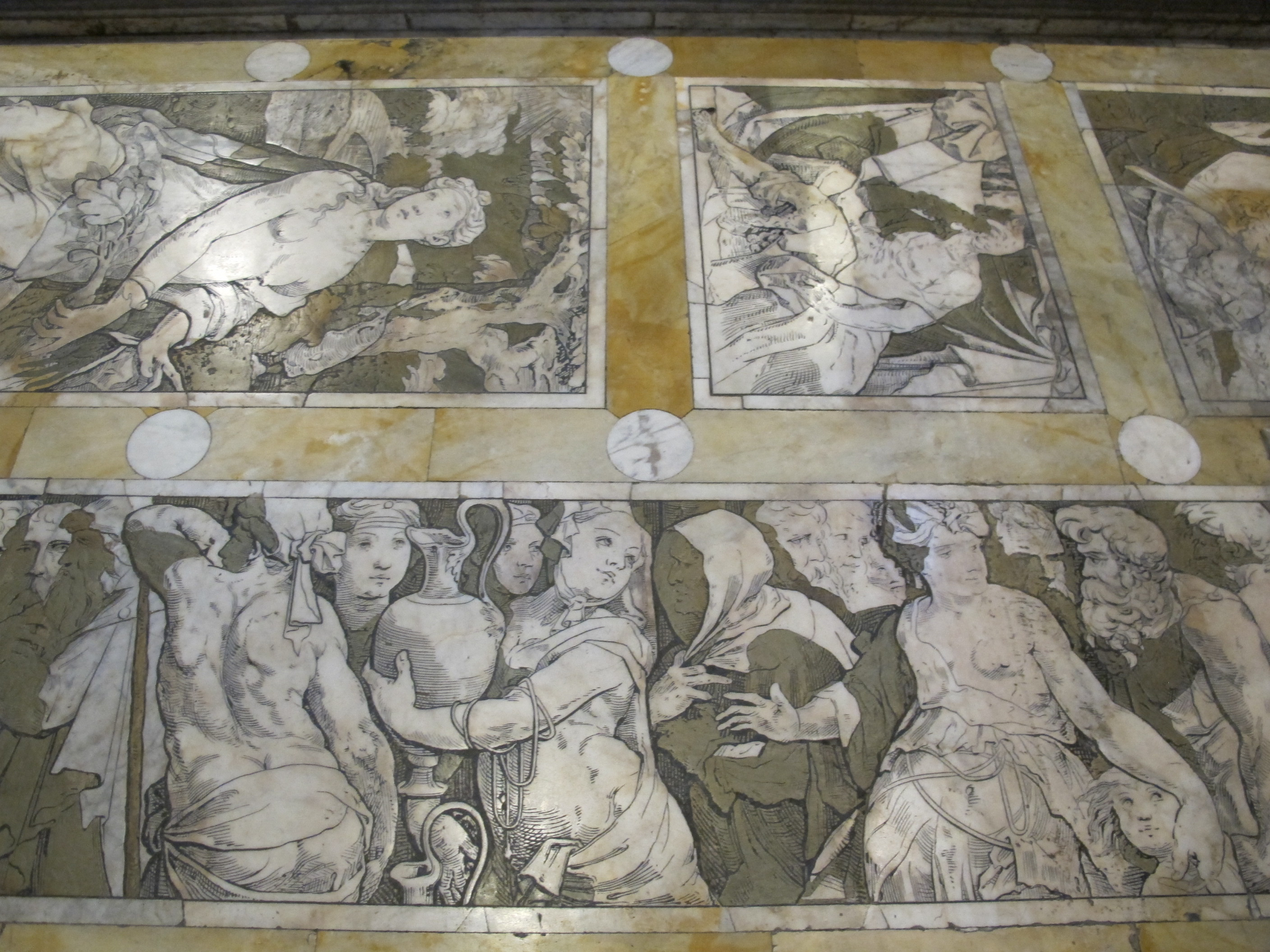 Beccafumi, fregio dell'altare